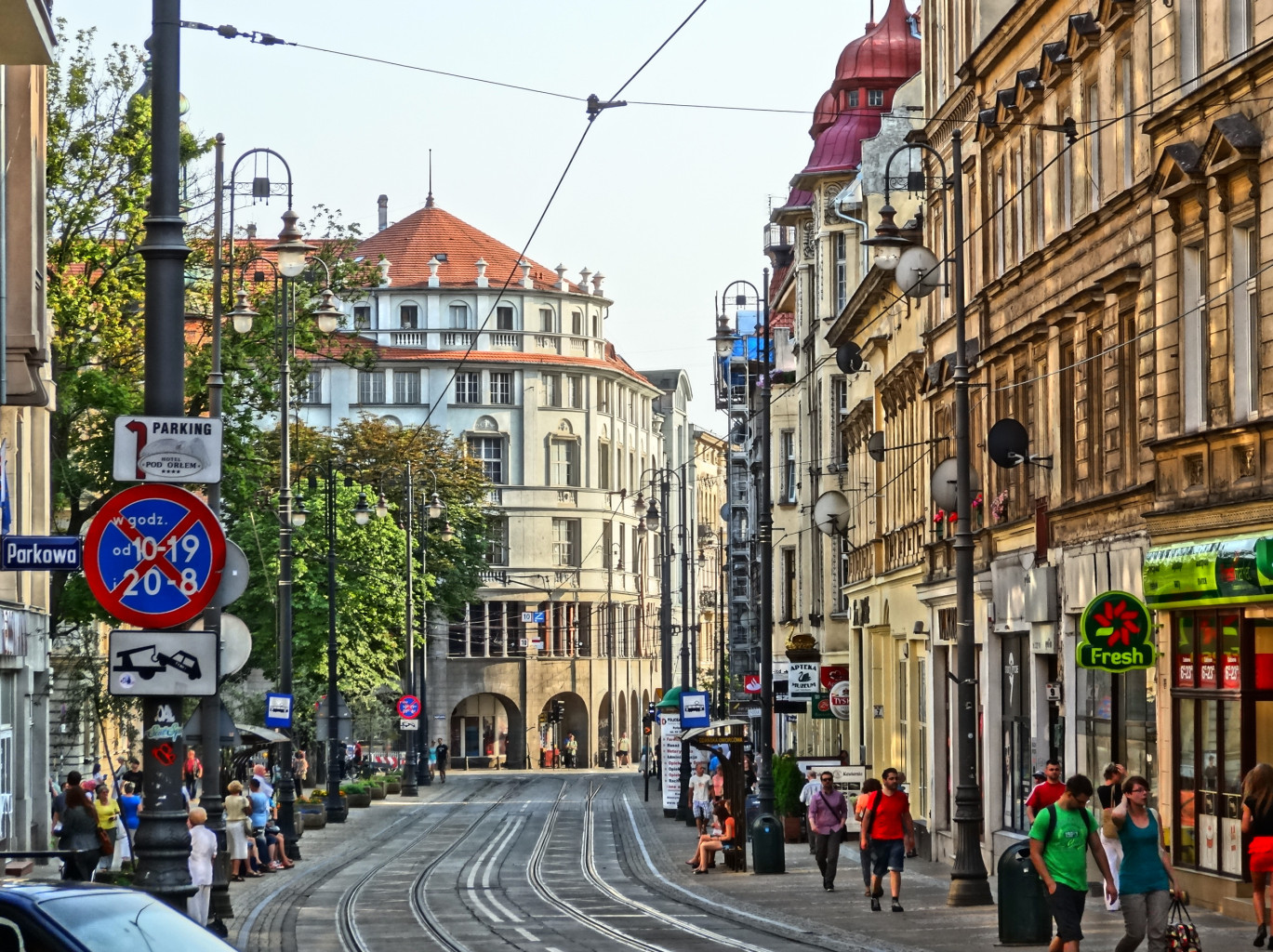 Ulica Gdańska w Bydgoszczy na odcinku między ul. Jagiellońską, a ul. Dworcową